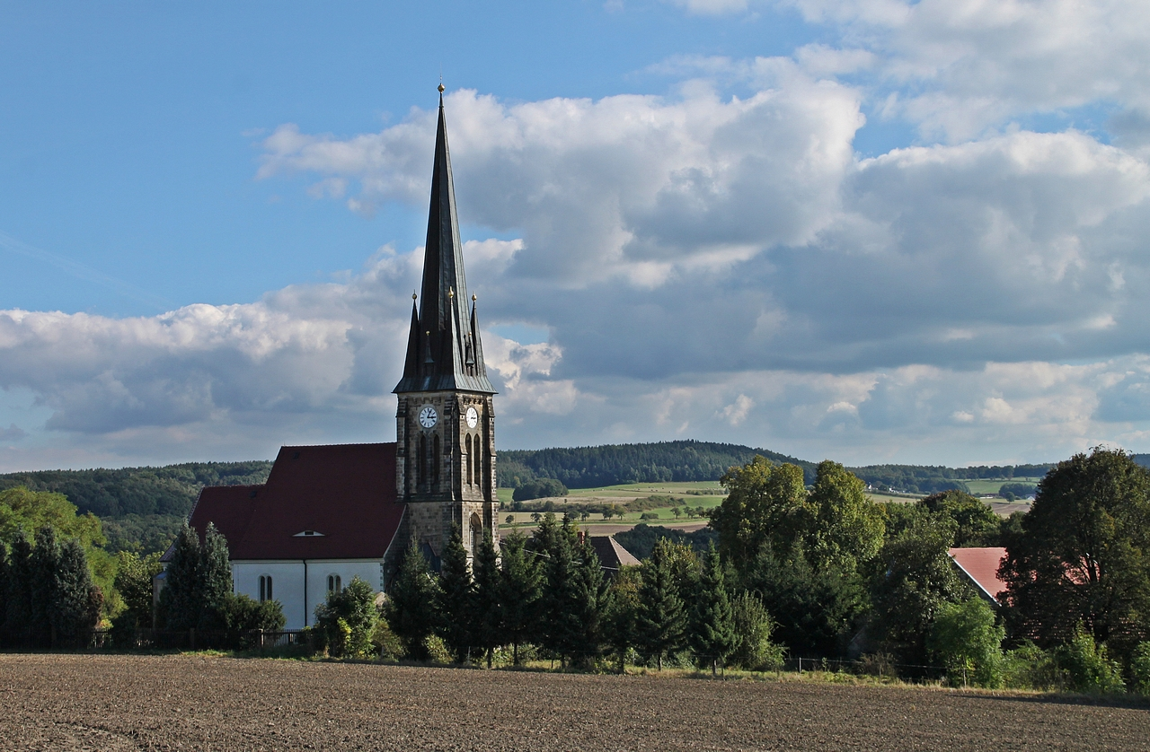 Friedrichswalde (Gemeinde Bahretal): Blick auf die evangelische Kirche. Die Kirche entstand 1647, nachdem der Vorgängerbau im Dreißigjährigen Krieg zerstört wurde. Turm und Westgiebel wurden Ende des 19. Jahrhunderts angefügt. Zur Innenausstattung gehört eine Orgel der Gebrüder Jehmlich aus dem Jahr 1905.